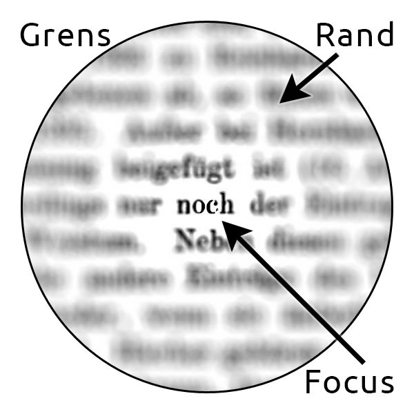 Het spotlicht model van aandacht